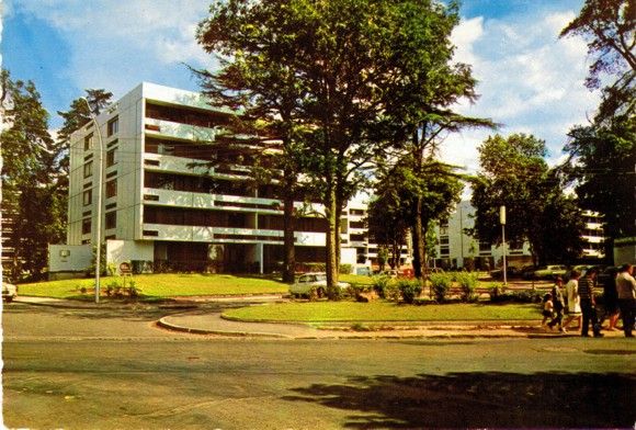 HLM à Draveil , avec des espaces verts .